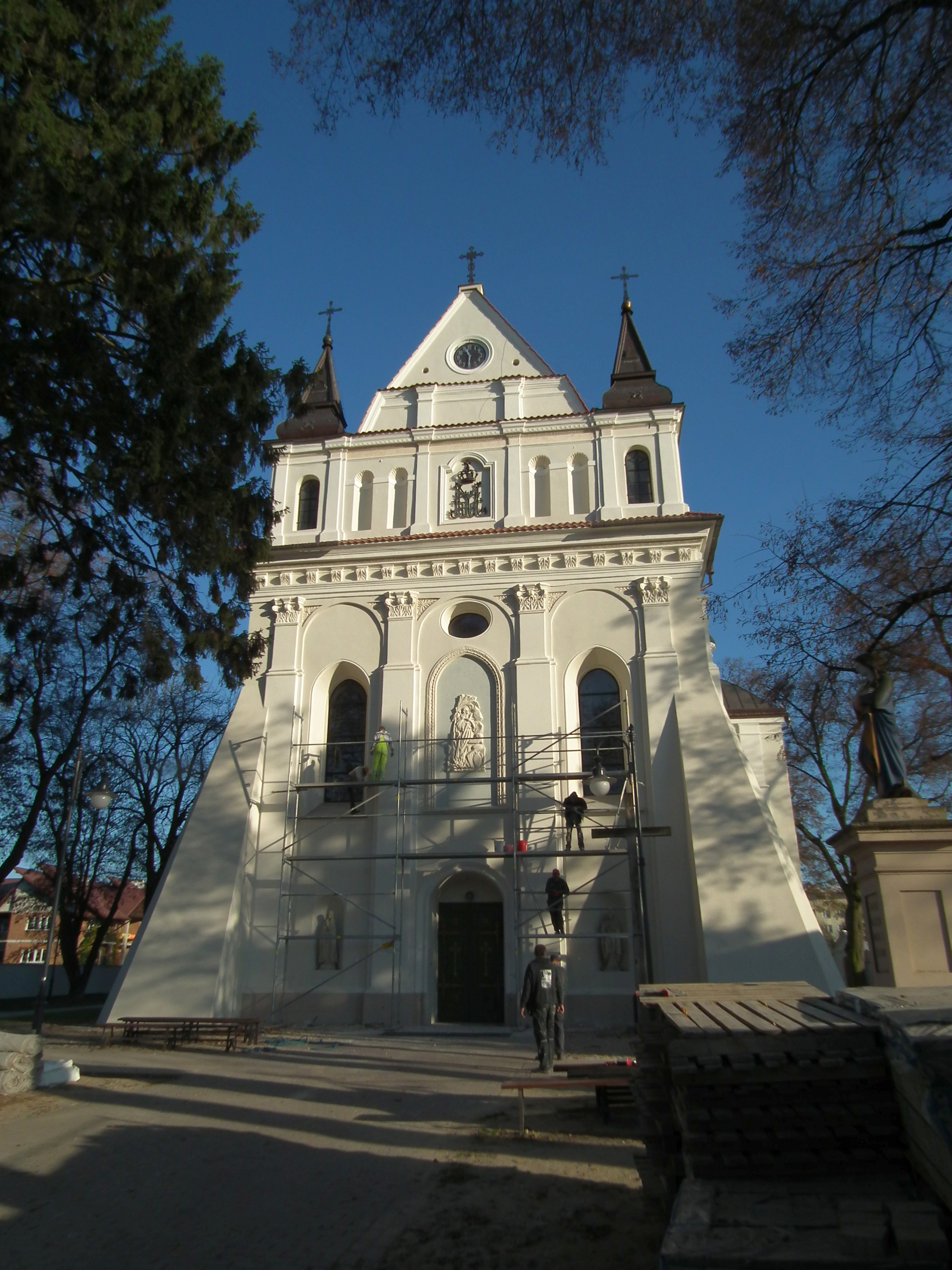 Pierwotny kościół, drewniany, funkcjonował do czasu pożaru w 1615 r. Następny, istniejący do dnia dzisiejszego, został zbudowany w latach 1618-1631 z fundacji Adama Noskowskiego.